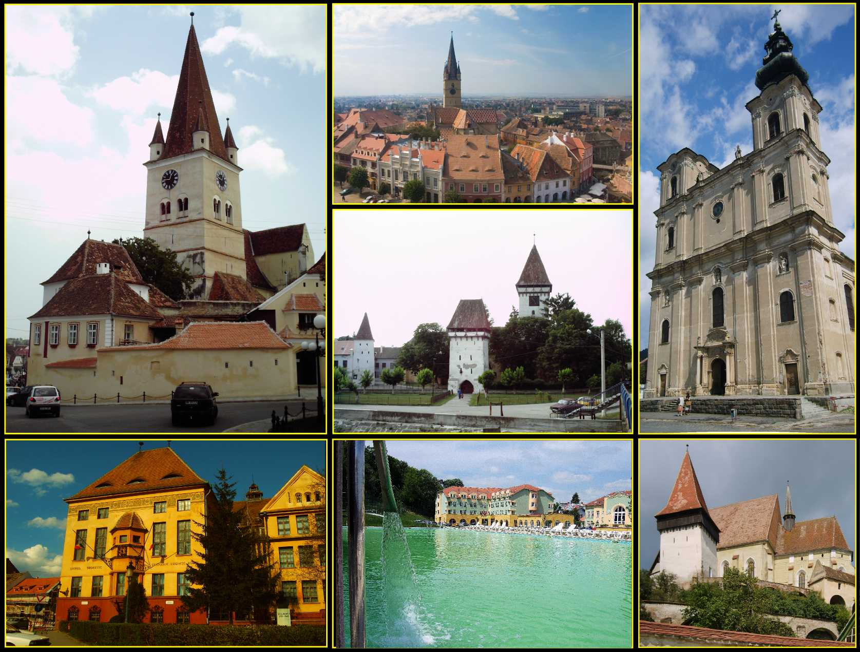 Colaj foto de prezentare a județului Sibiu, România.